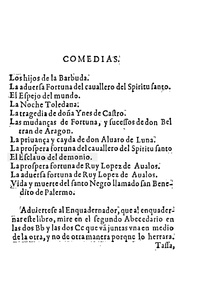 Índice de la Tercera parte de las comedias de Lope de Vega y otros autores. Madrid : en casa de Miguel Serrano de Vargas : a costa de Miguel Martínez, 1613.